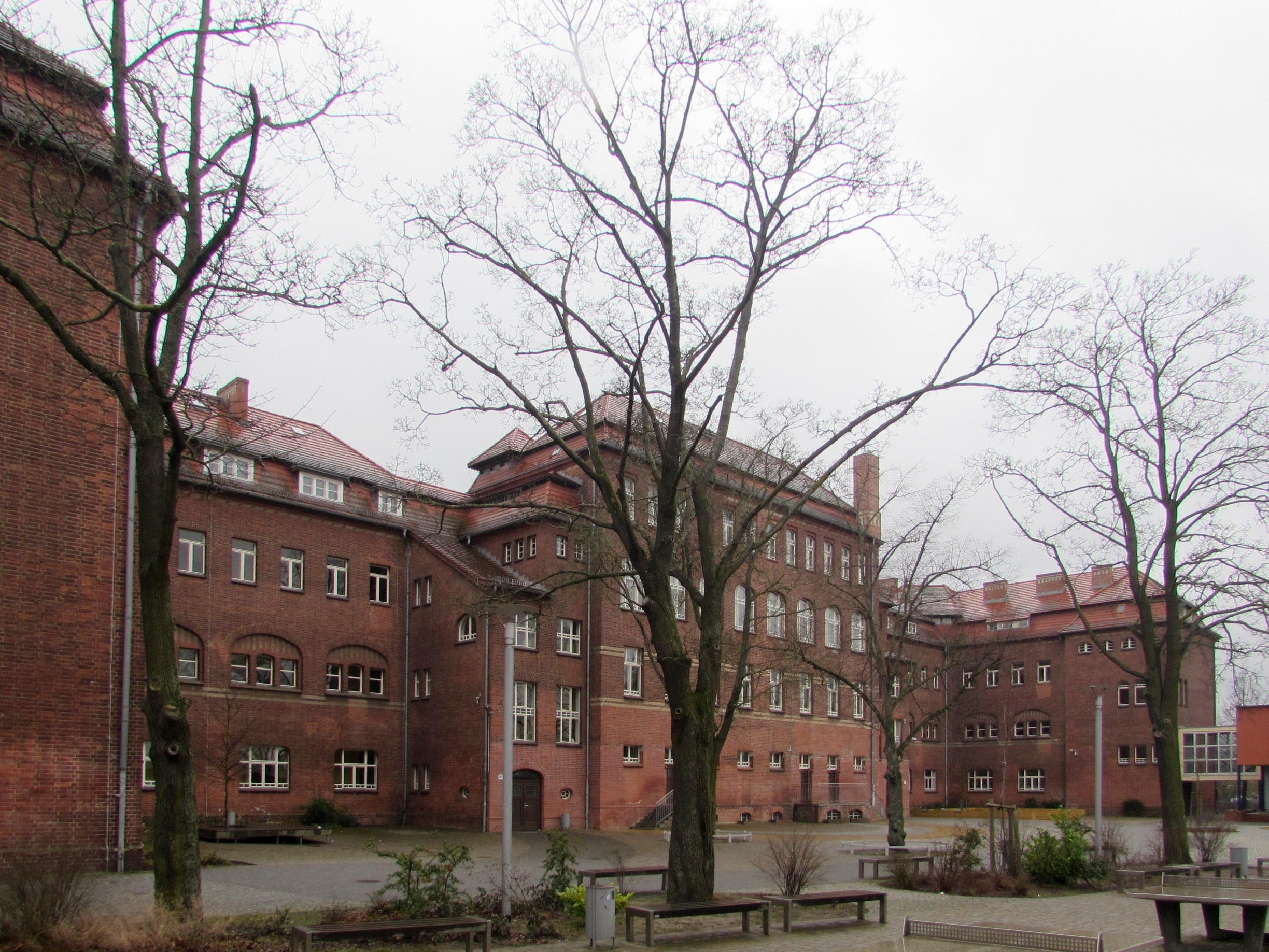 von saldern-gymnasium, schulhofseite